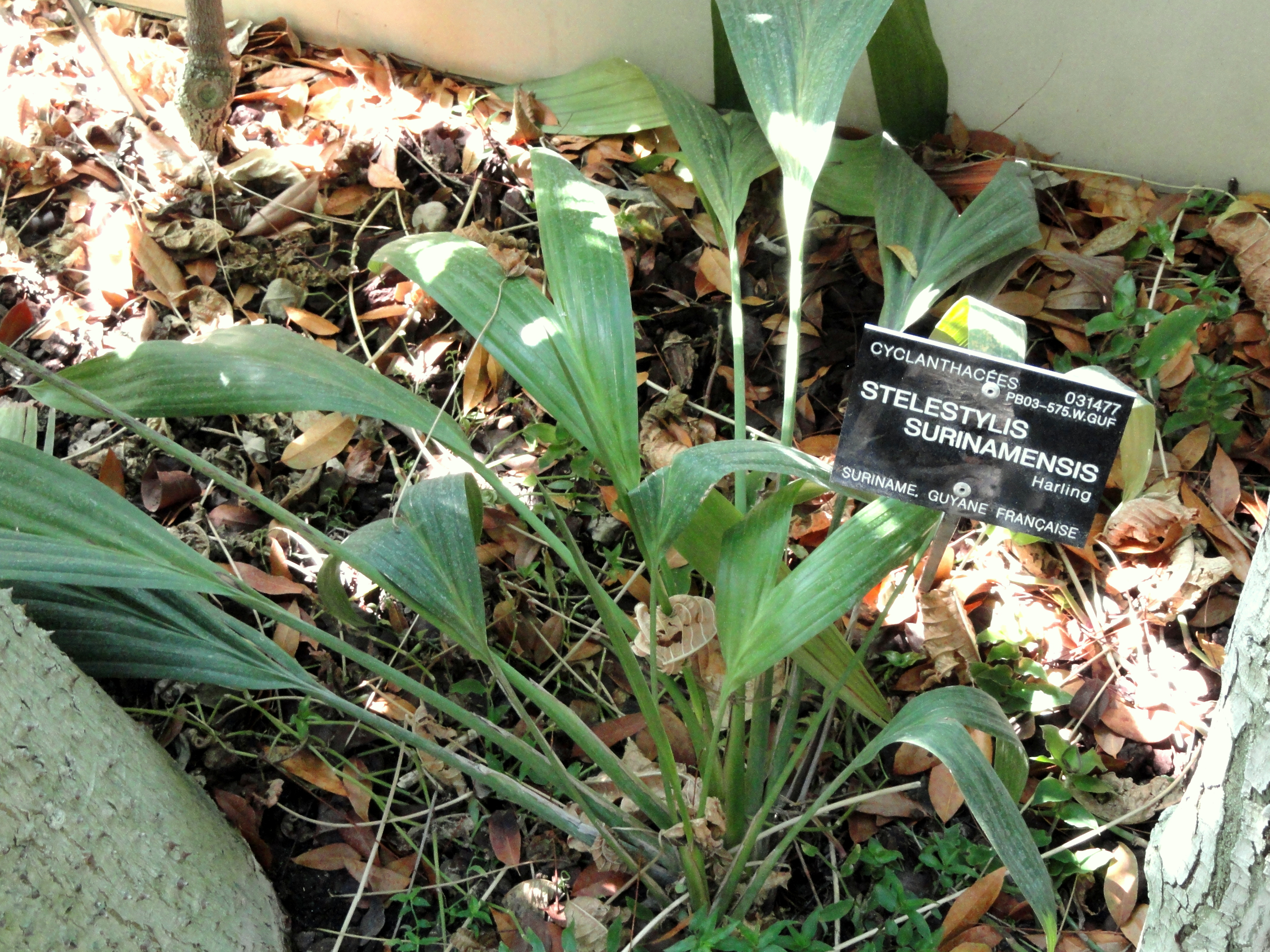 Stelestylis surinamensis specimen in the Jardin Botanique de Lyon, Parc de la Tête d'Or, Lyon, France.